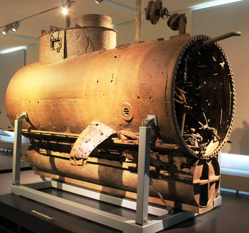 Mittelsektion des Klein-U-Boot Seehund